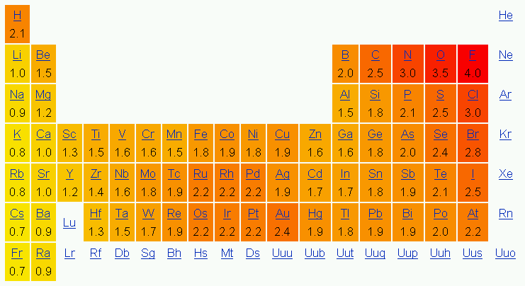 generat gràfic a partir de la wikipedia anglesa (escala de Pauling) joanjoc 15:31 24 ago, 2004 (UTC)